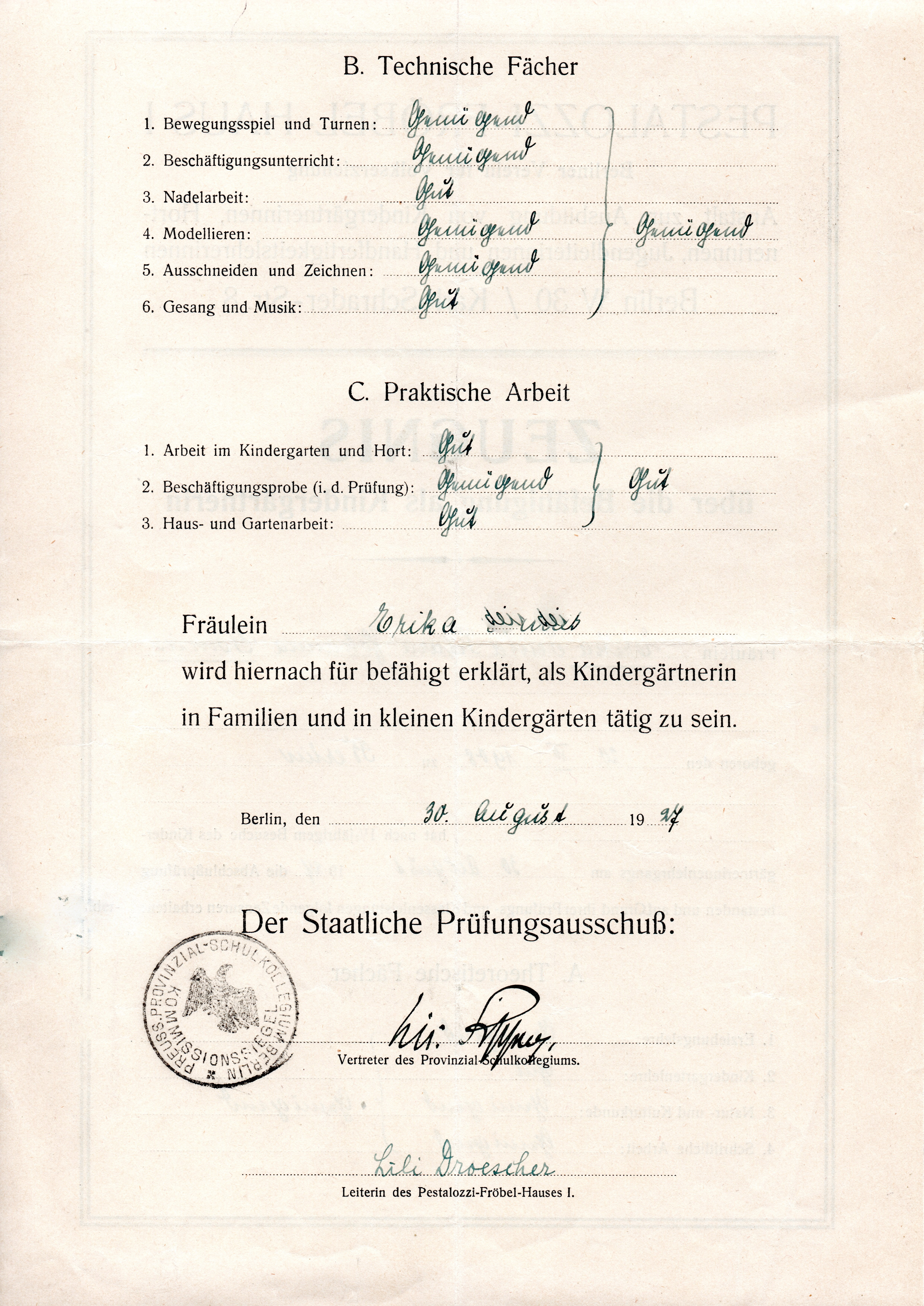 Zeugnis PFH Berlin